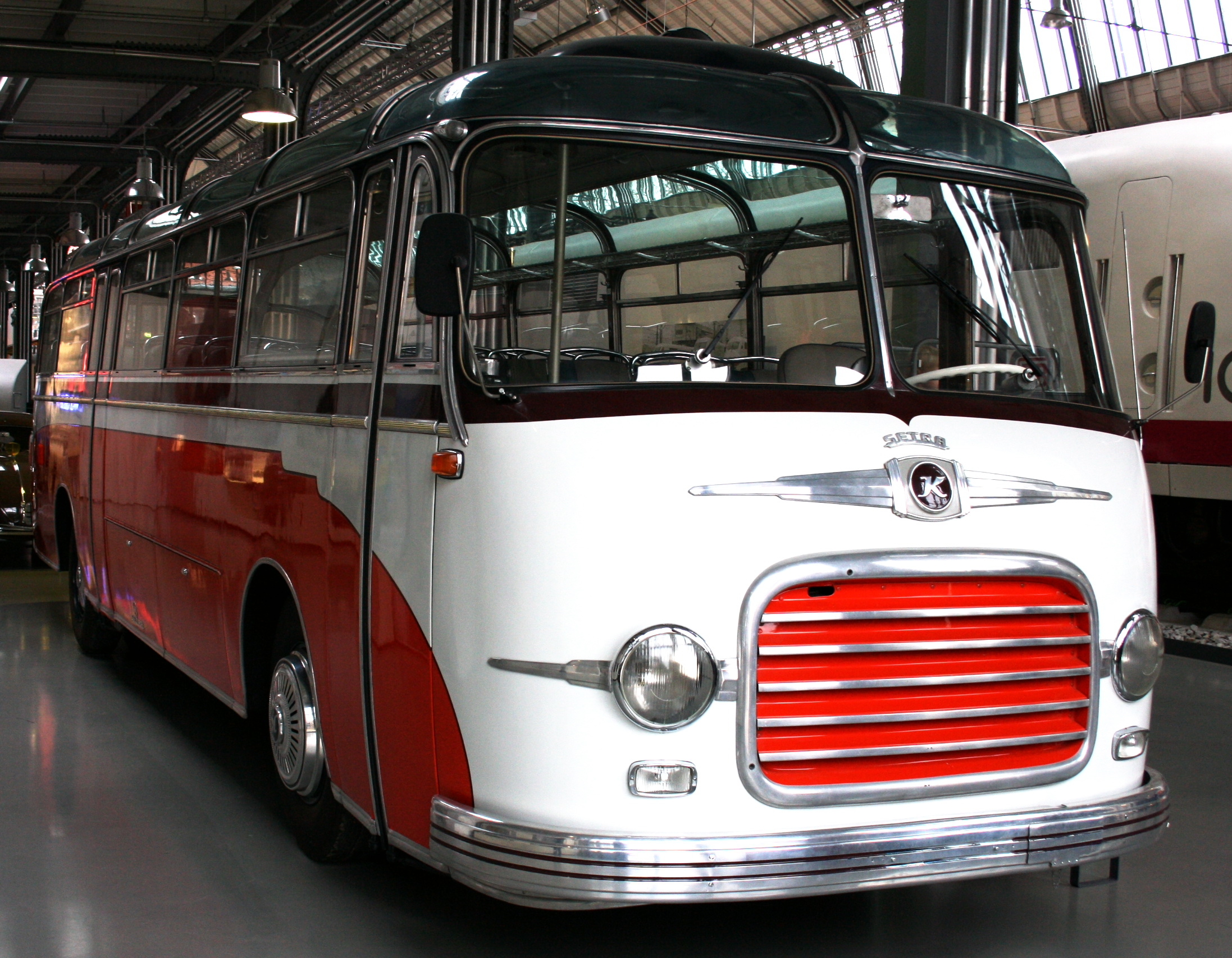 Bus der Marke Kässbohrer Setra Typ S 11 Sechzylinder Diesel, 6126 qcm Hubraum, 92 KW bei 2500 Umdrehungen, Höchstgeschwindigkeit 100 km/h